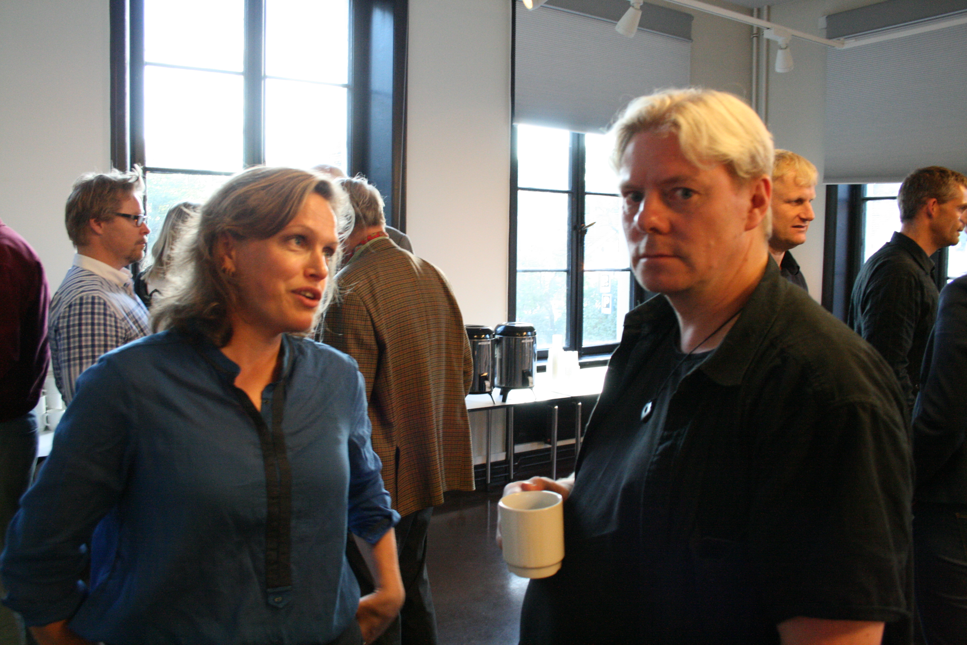 Siri Engesæth og Per Aage Pleym Christensen